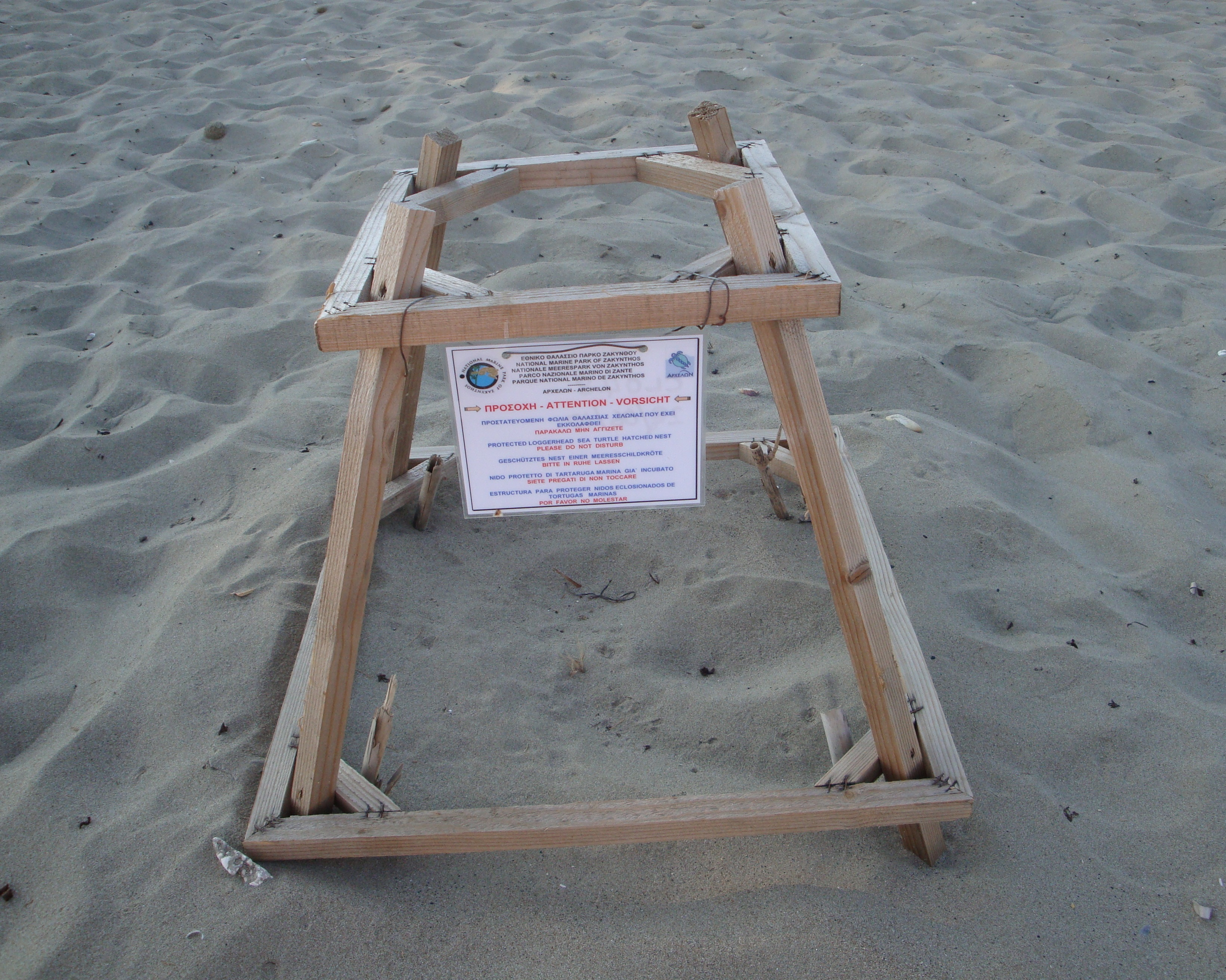 Označeno karetino gnezdo na Laganaški obali, otok Zakintos.